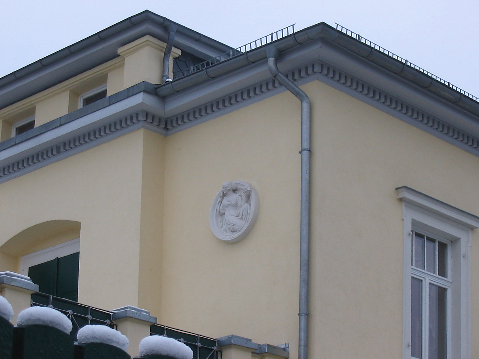 Radebeul, Villa „Sibi et Amicis“, Fassadendetail